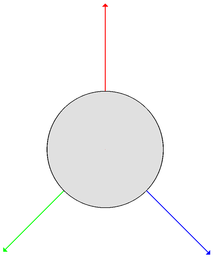 Baumknoten bei Wirbeltraversierung (noch unbesucht)